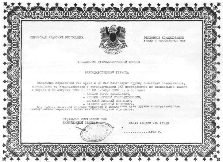 Дивизионный генерал Ашрам отметил высокую работоспособность группы «сто восьмого»: руководителя группы Е. К. Киреева, инженеров Б. В. Хлопова и Н. И. Мирового и шофёра А. Ф. Кадыкова; ставил её в пример и на прощание подписал благодарственную грамоту, в которой, назвав всех поименно, отметил выполнение поставленной специальной задачи.